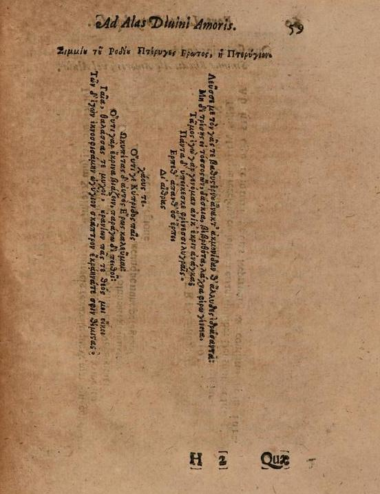 Calligrame Les Ailes de Simmias de Rhodes, publié dans le livre Ad alas amoris divini a Simmia Rhodio compacta de Fortunio Liceti qui est consacré à ce caligramme.